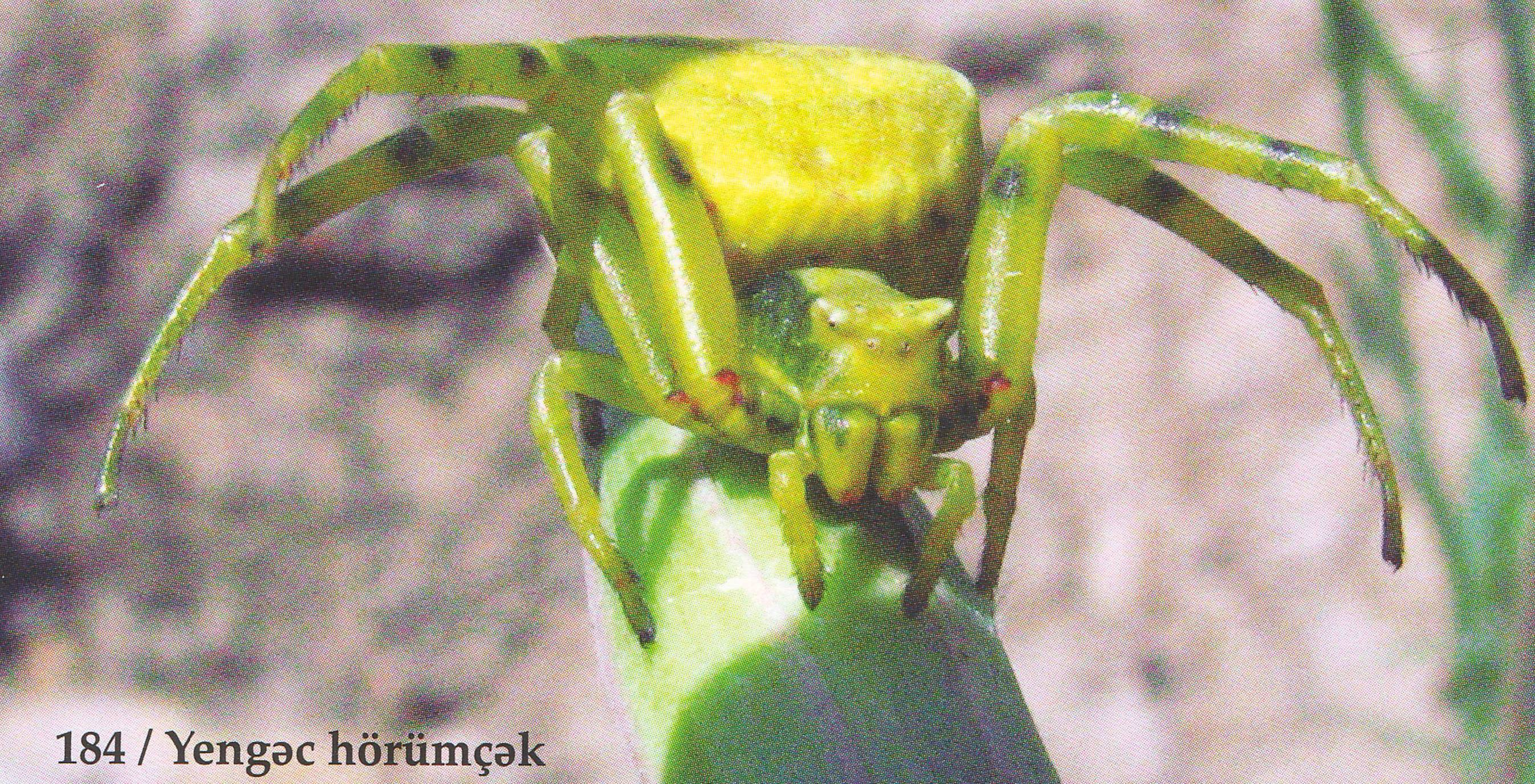 Kürdəmir Yengəc hörümçək